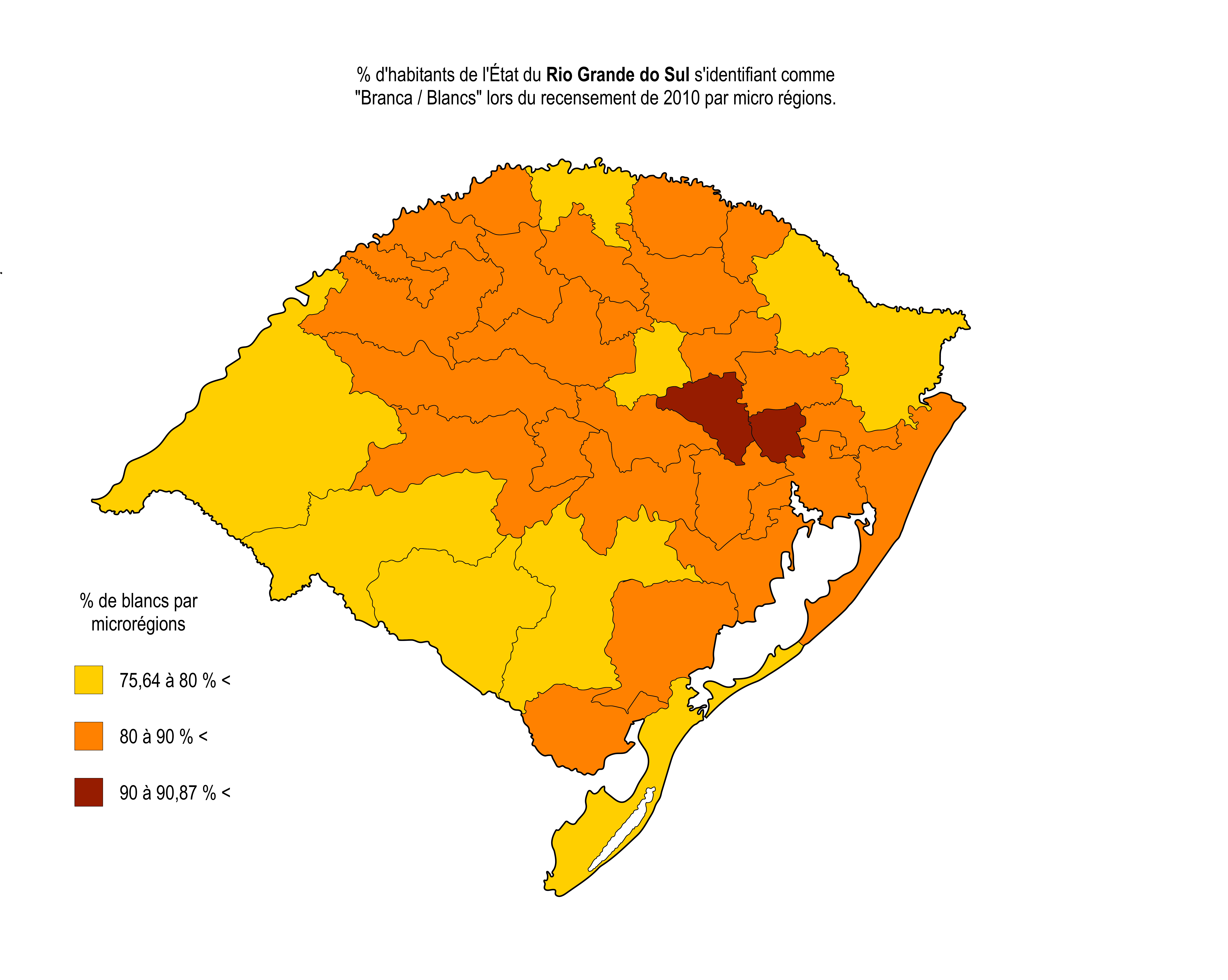 RIO GRANDE DO SUL : % d'habitants se définissant comme "Blancs / Branca" lors du recensement de 2010 par État de la Fédération.